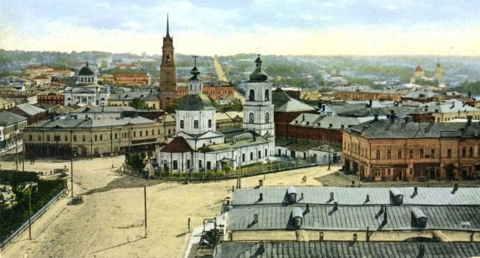 Крестовоздвиженская церковь в Туле